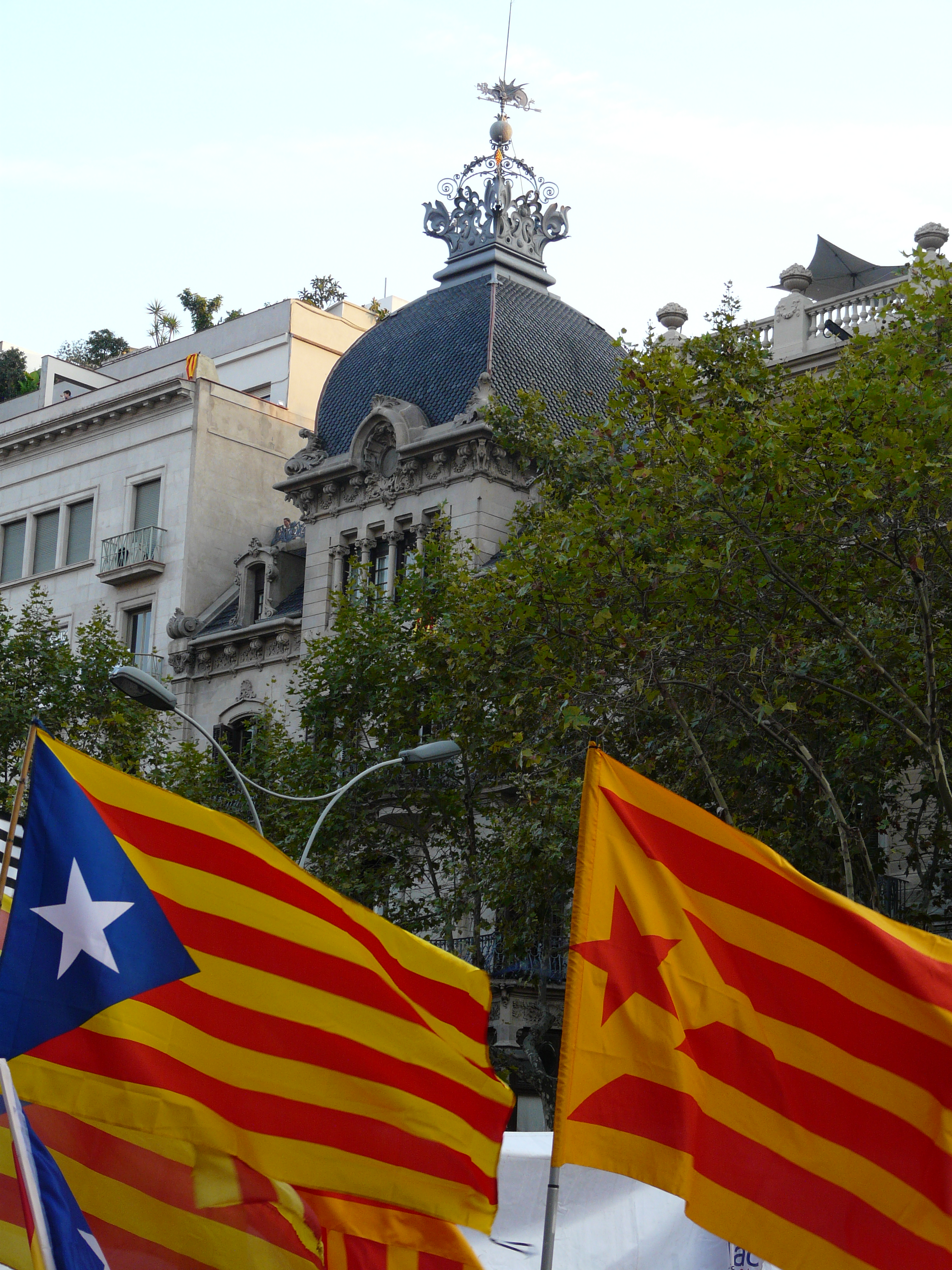 Casa Malagrida (Barcelona) Object location41° 23′ 26.41″ N, 2° 09′ 58.2″ E